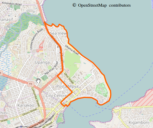 Kiswahili: Map of Kivukoni Ward in Dar es Salaam